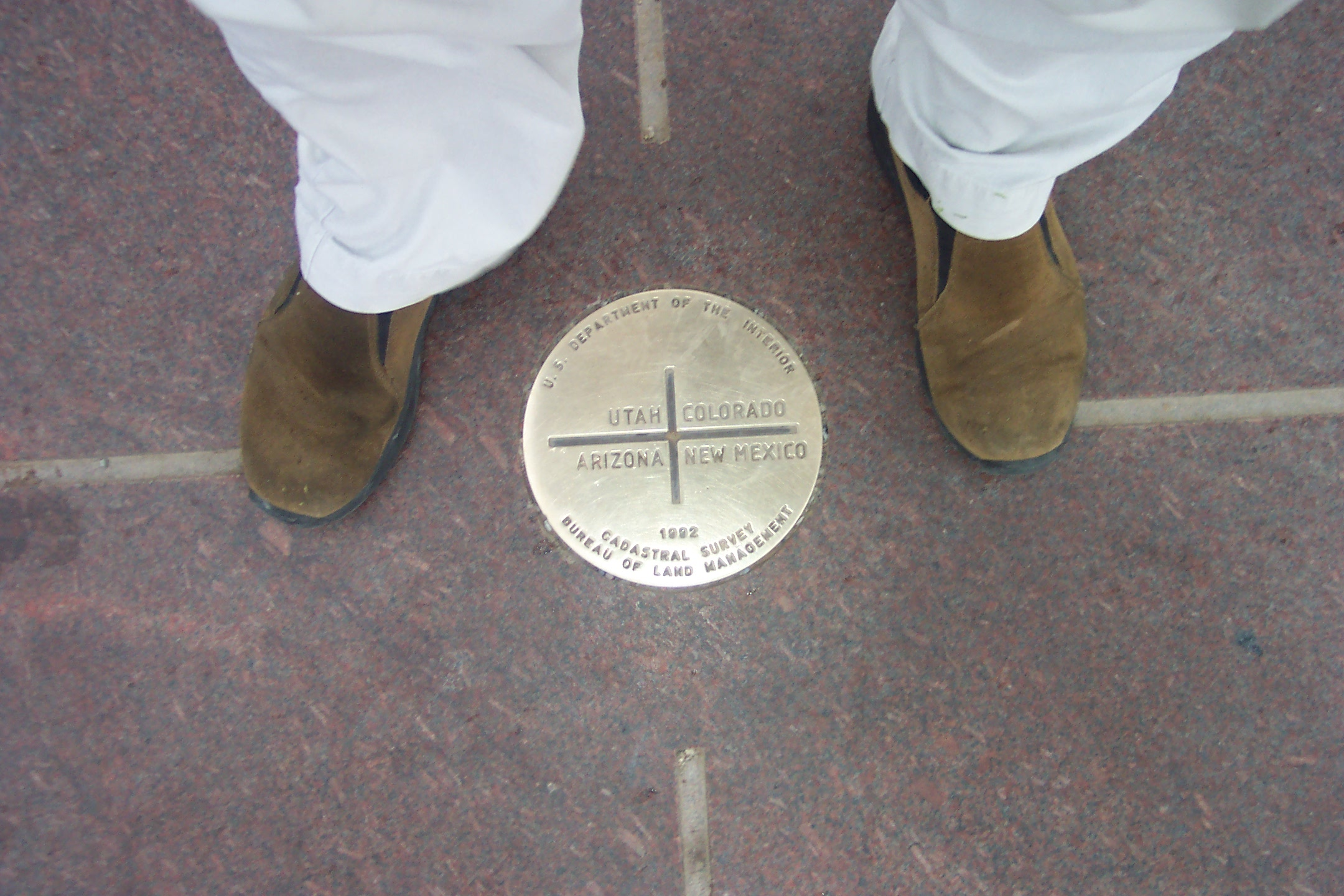 La photo ultra classique de ceux qui sont allés dans un de ces états